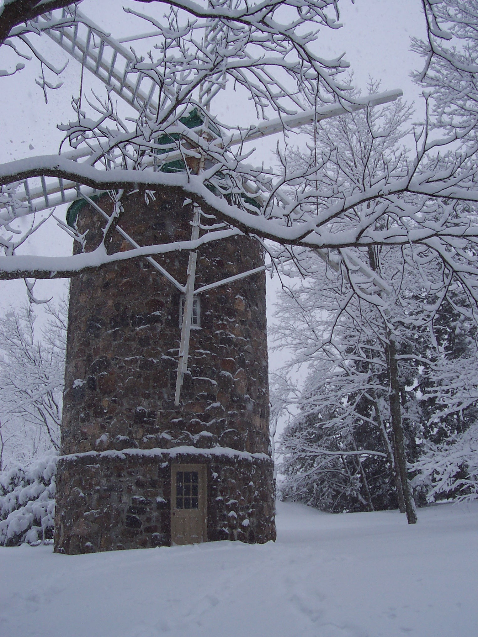 Scène d'hiver près du vieux moulin au Jardin zoologique du Québec. Winter scene near the old windmill at the Quebec zoological garden. Photo par/taken by Boréal (User:Boréal)